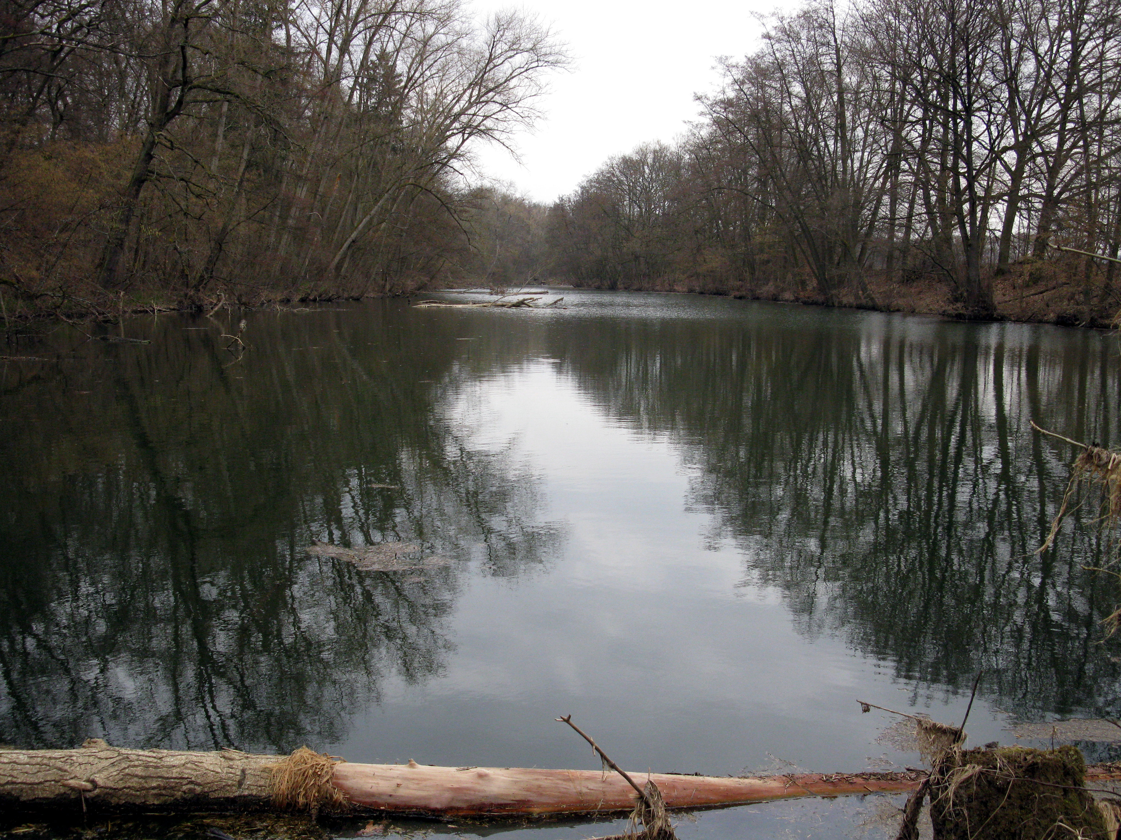 (LSG:BY-LSG-00084.01)_Schutz eines Landschaftsteils im Bereich der Stadt Schweinfurt und des Landkreises Schweinfurt - Sennfelder See